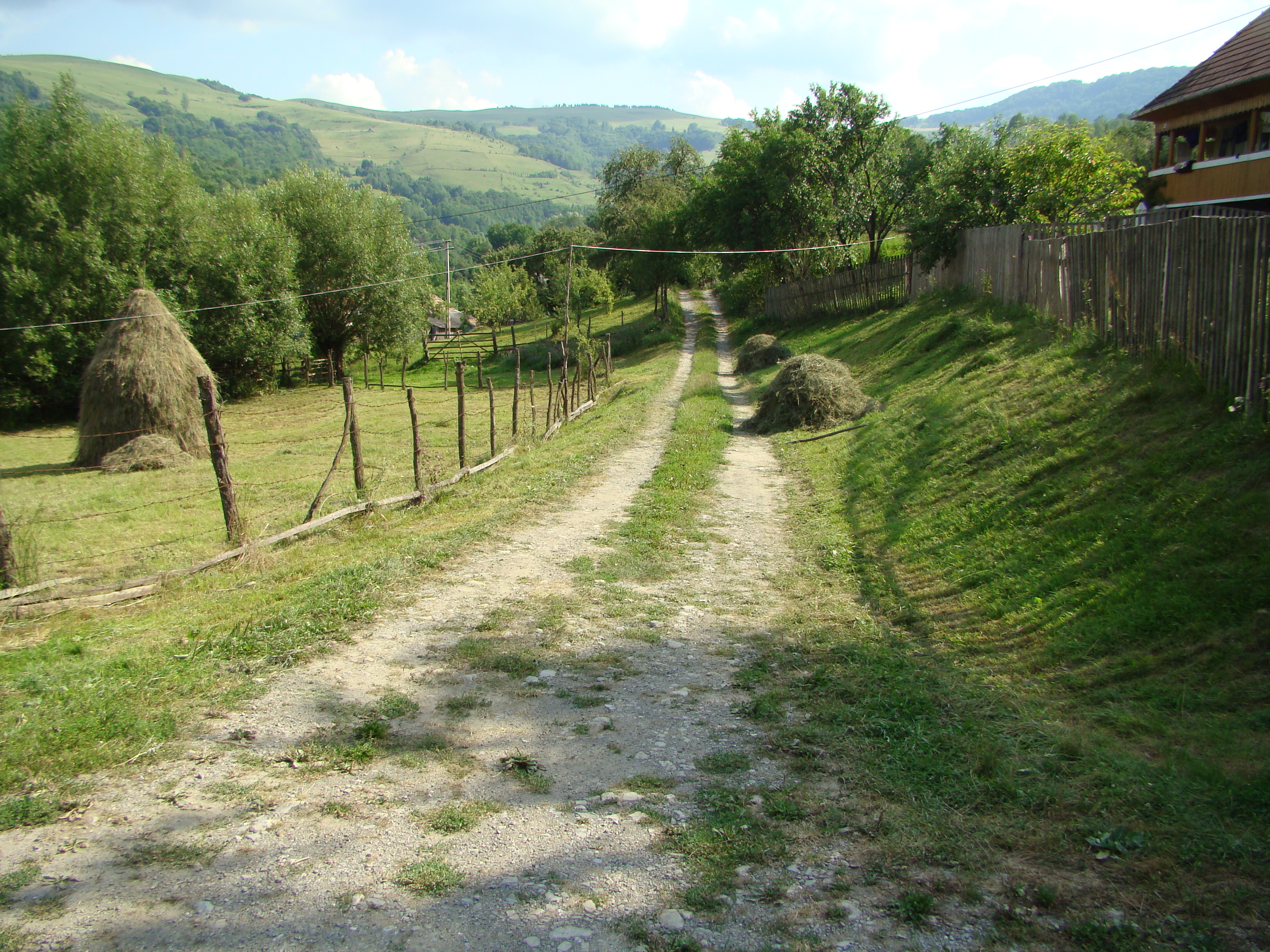 Biserica de lemn din Valea Largă-Alba